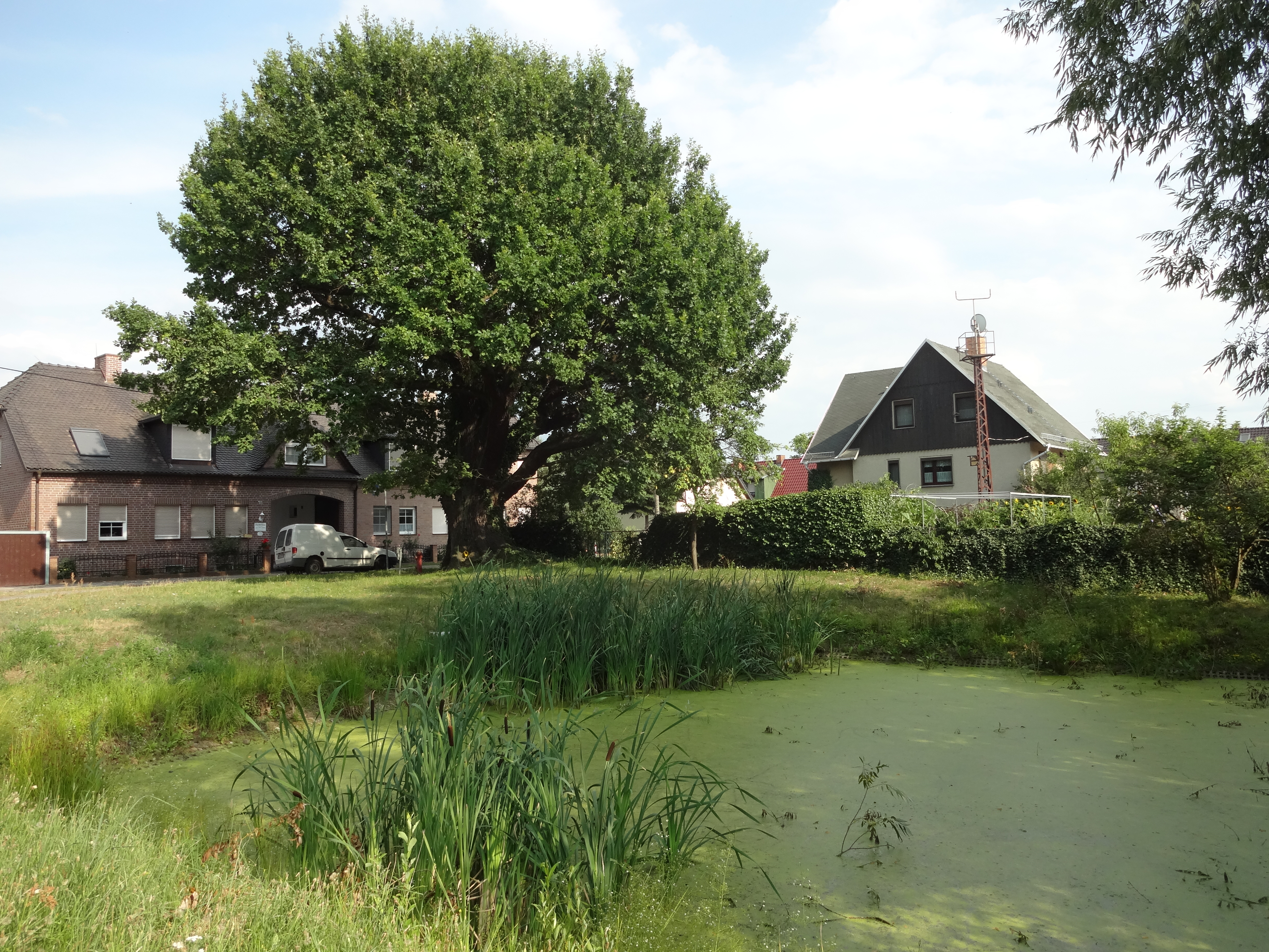 Naturdenkmal Stieleiche am Dorfplatz in Ragow (Lübbenau/Spreewald))